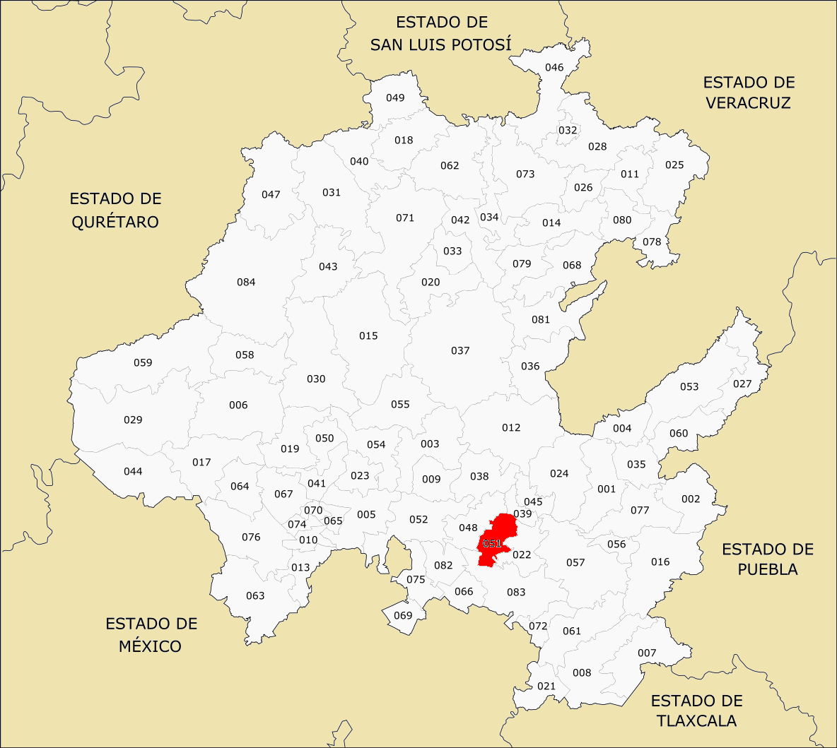 Municipio de Hidalgo